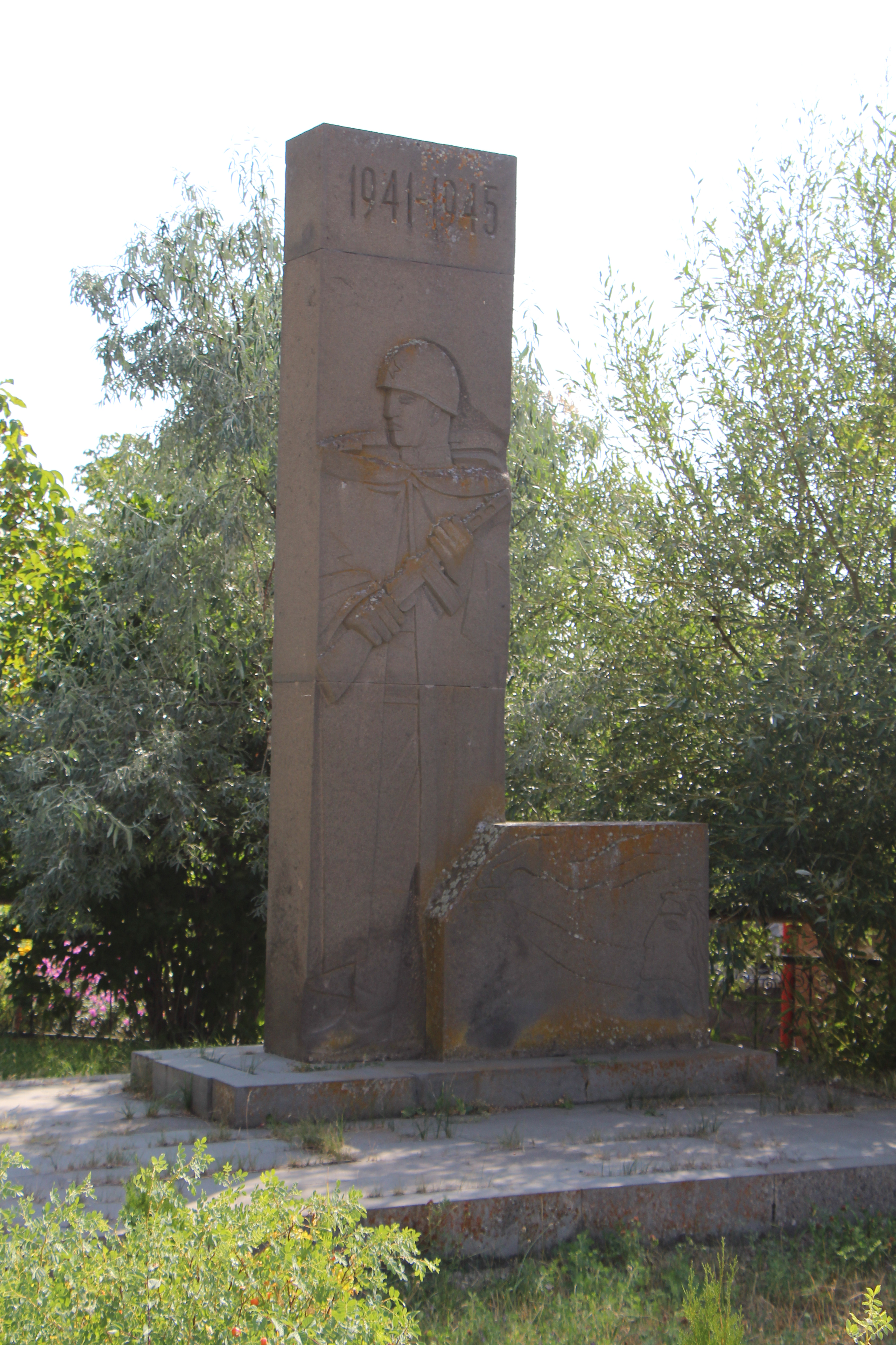 Կաթնաղբյուր, Արագածոտնի մարզ, ՀՈՒՇԱՐՁԱՆ` ԵՐԿՐՈՐԴ ԱՇԽԱՐՀԱՄԱՐՏՈՒՄ ԶՈՀՎԱԾՆԵՐԻՆ 1975 թ. գ. մ. 2.57/8 57/8